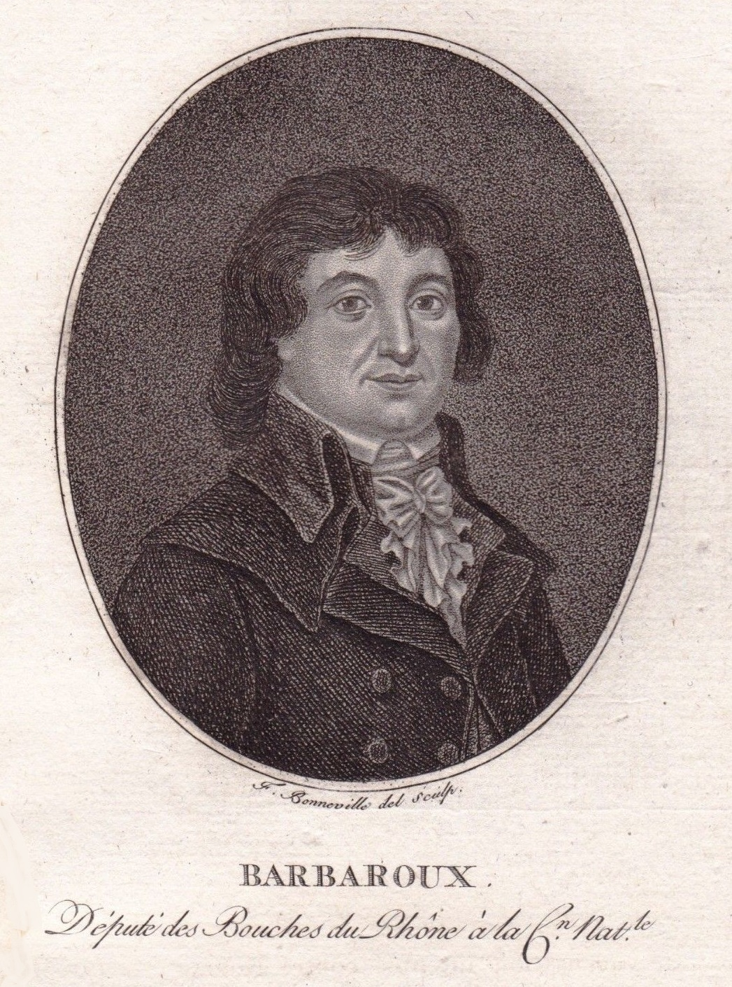 Barbaroux député des Bouches-du-Rhône à la Convention nationale, gravure de Sandoz d'après François Bonneville.